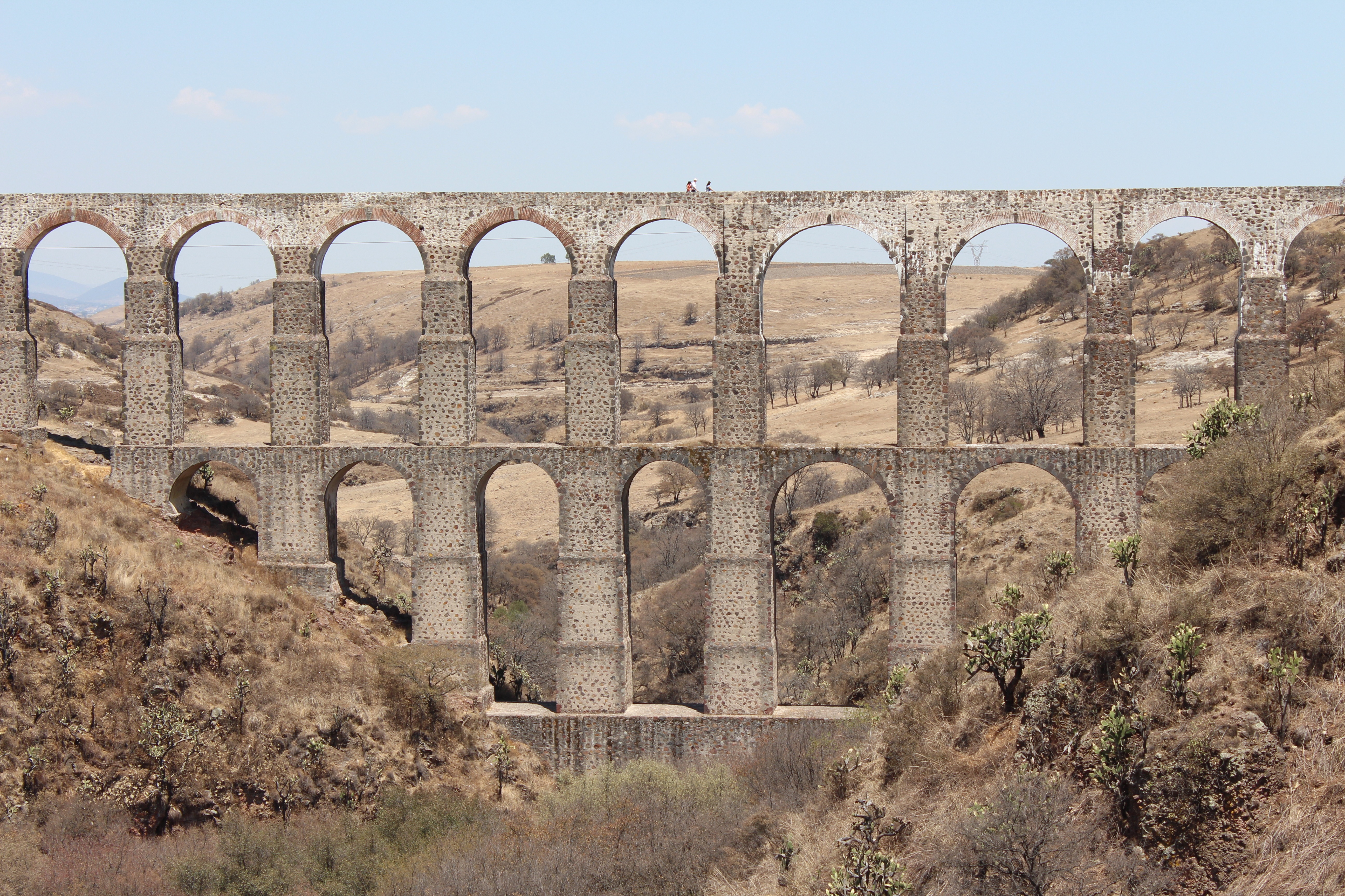 Es un monumental acueducto que fue edificado por los frailes jesuitas a principios del siglo XVIII para llevar agua al colegio de Tepotzotlán desde el río del Oro. Cuenta con cuatro niveles de arcos en la parte más profunda de una barranca que alcanza más de 60 metros de altura y en total comprende 58 arcos. Tiene una longitud de 438 m desde la barranca del Cerro Jorobado.